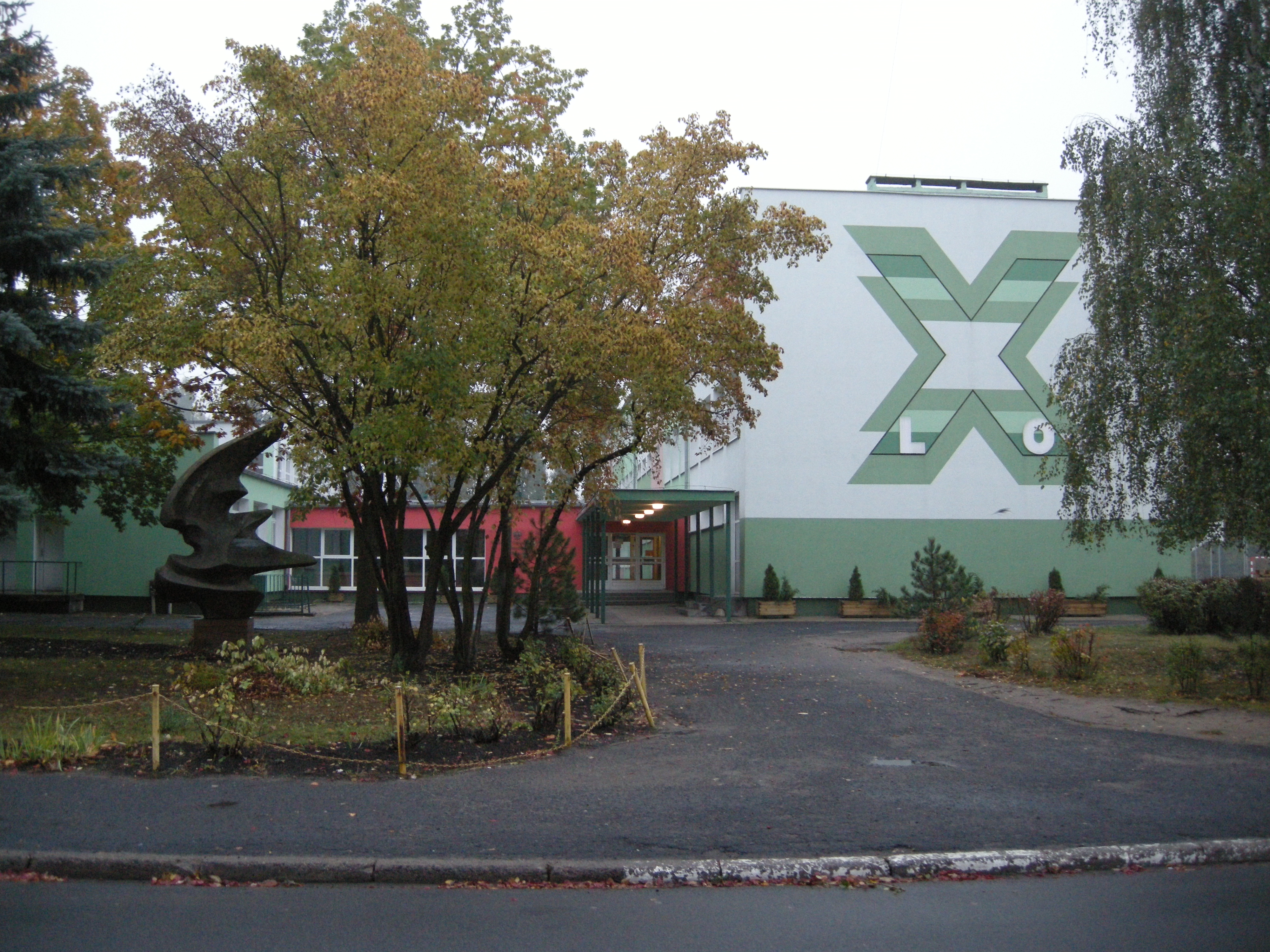 Osiedle Rzeczypospolitej w Poznaniu. Liceum Ogólnokształcące nr 10. Widok od strony ulicy Wyzwolenia.